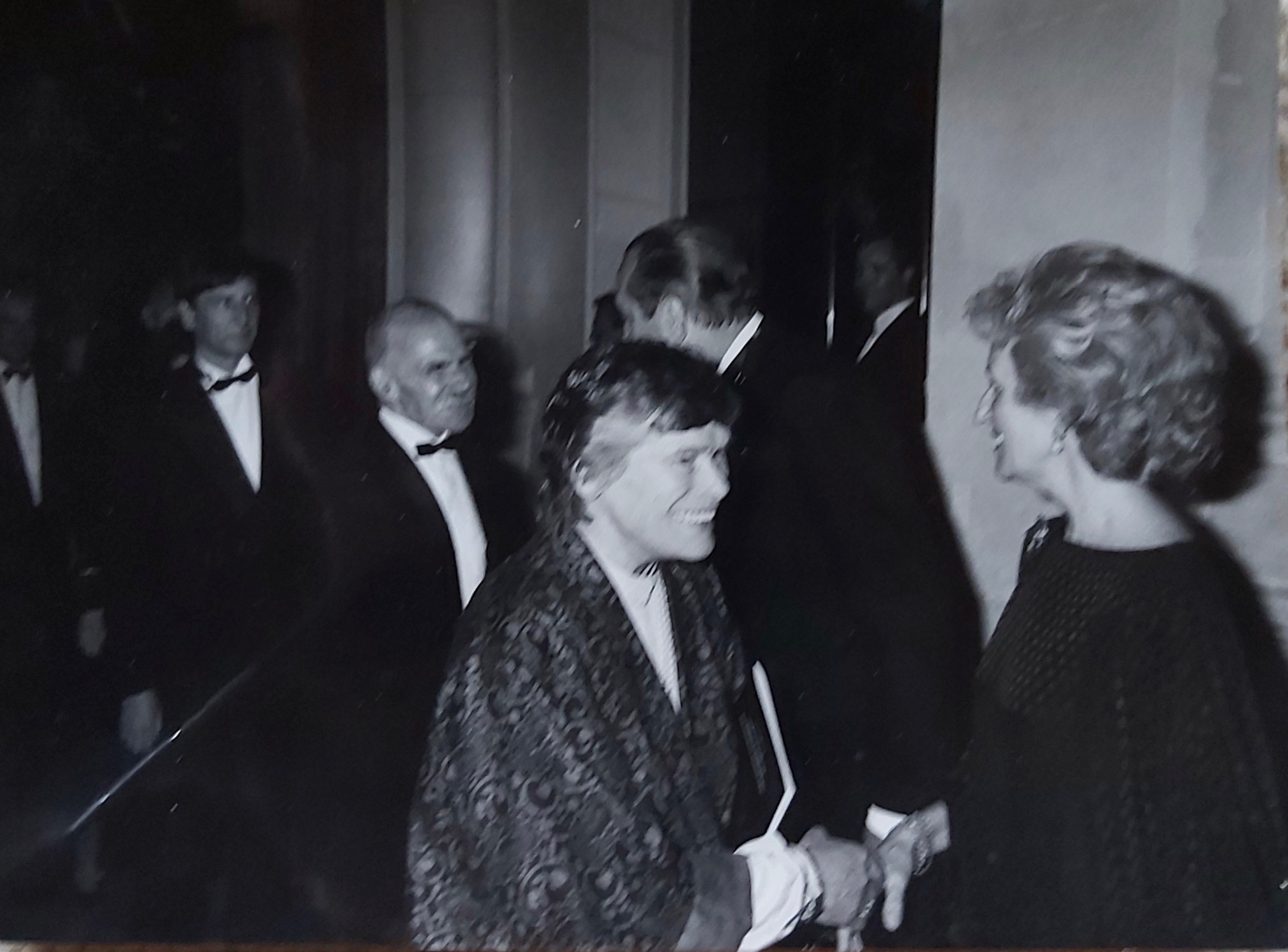 Lors d'un Gala